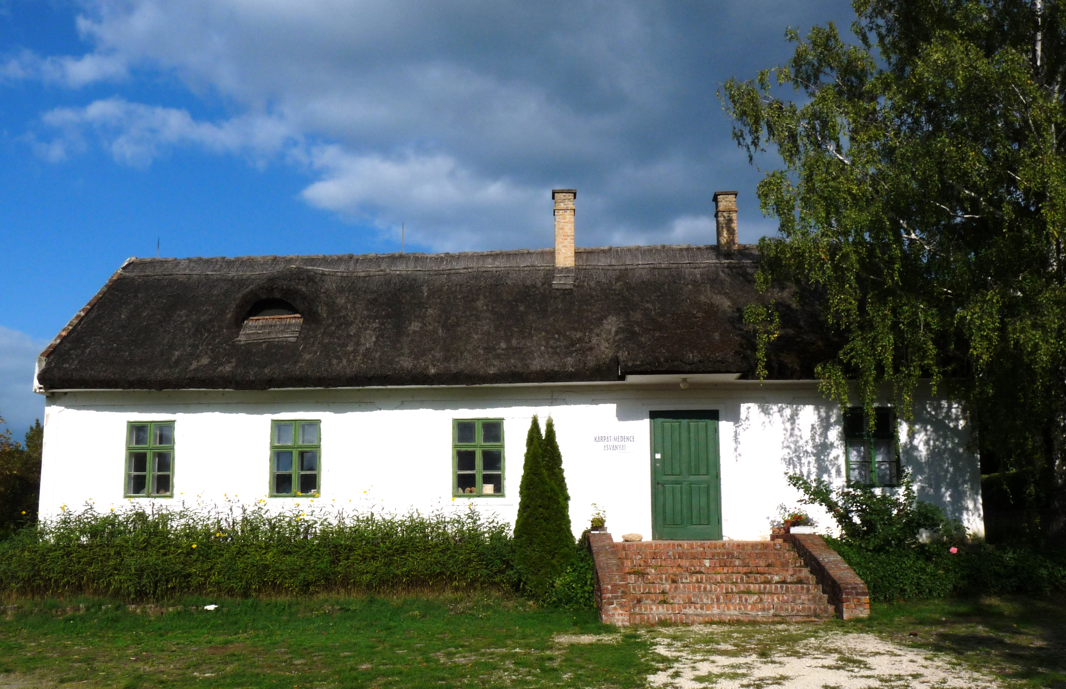 Szántódpuszta, majorsági épületegyüttes – lakóház, v. cselédház This is a photo of a monument in Hungary. Identifier: 13729